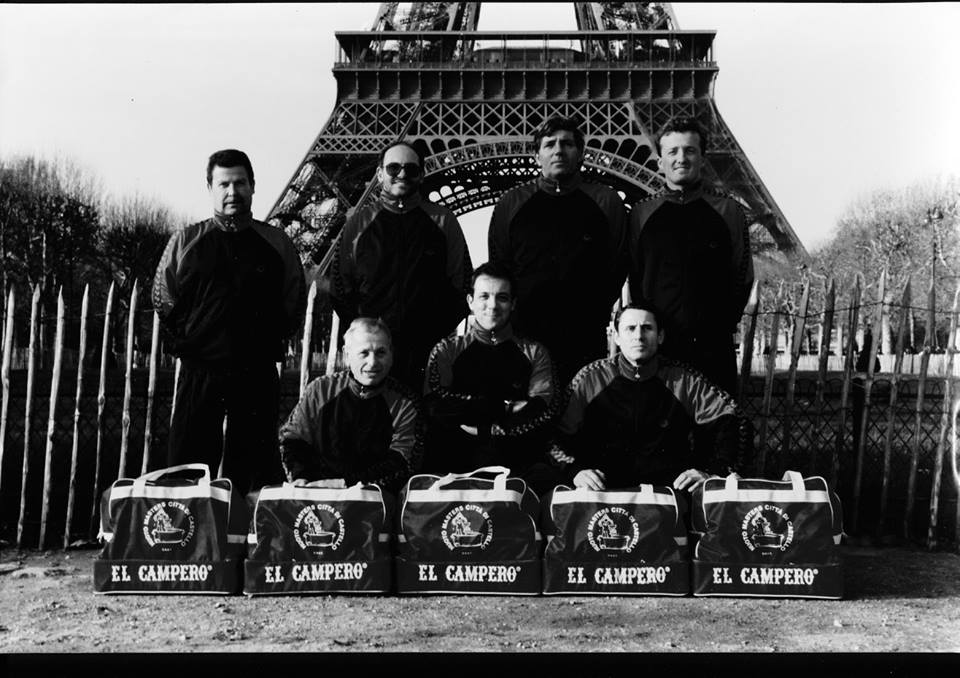 La prima squadra Master di Città di Castello in trasferta a Parigi